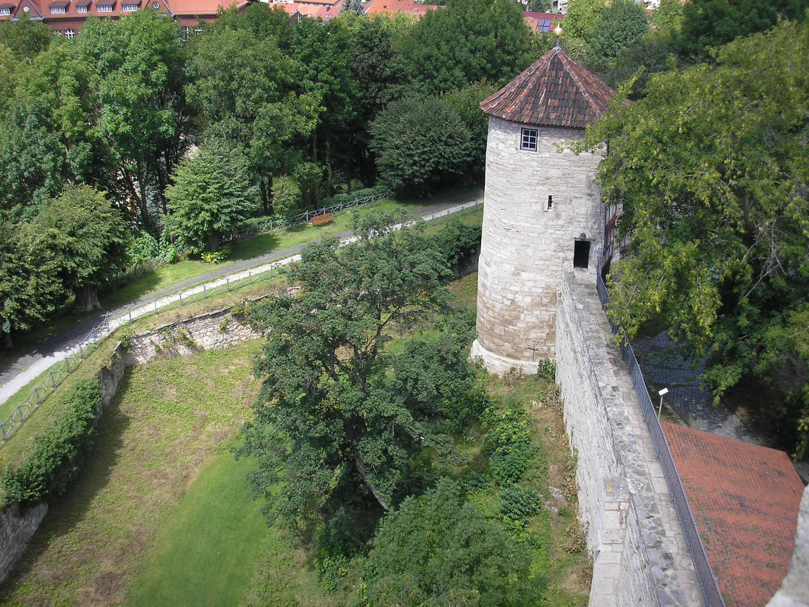 Blick über die Stadtbefestigung in Mühlhausen (Thüringen).